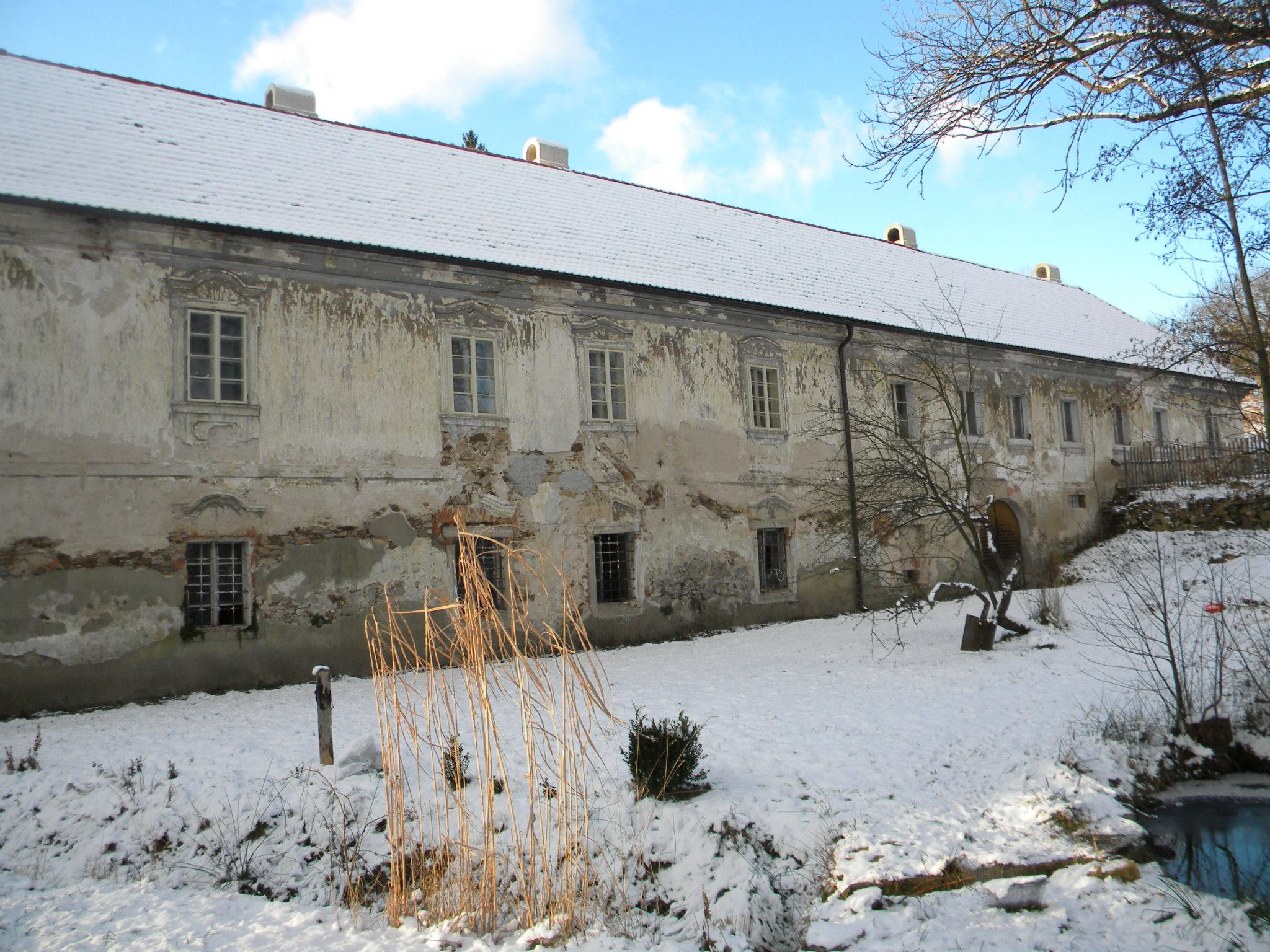 Fara, s omezením: bez objektu chlévů (Horní Pěna), v obci 1, Horní Pěna